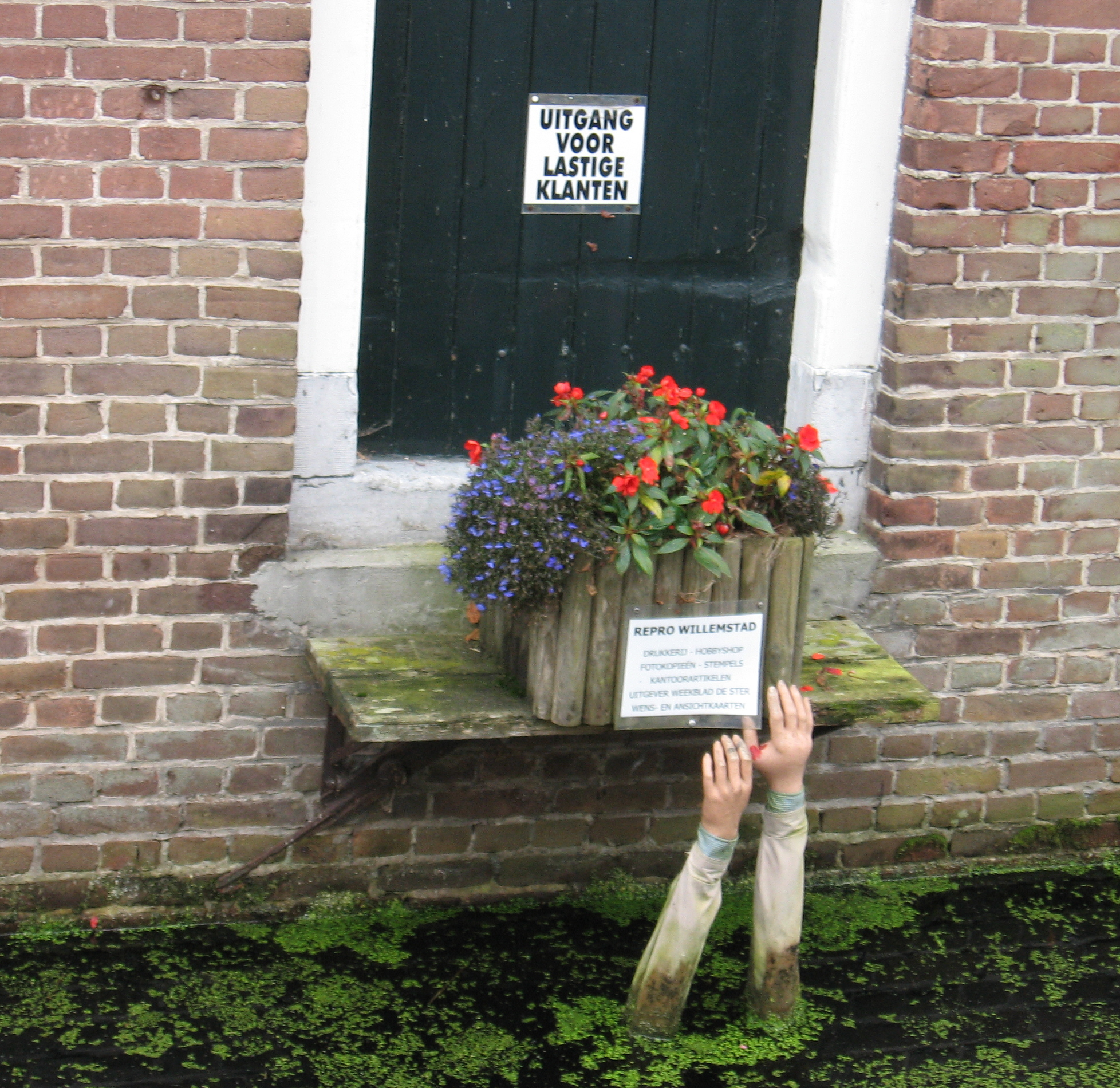 uitgang voor lastige klanten (ergens in Willemstad)